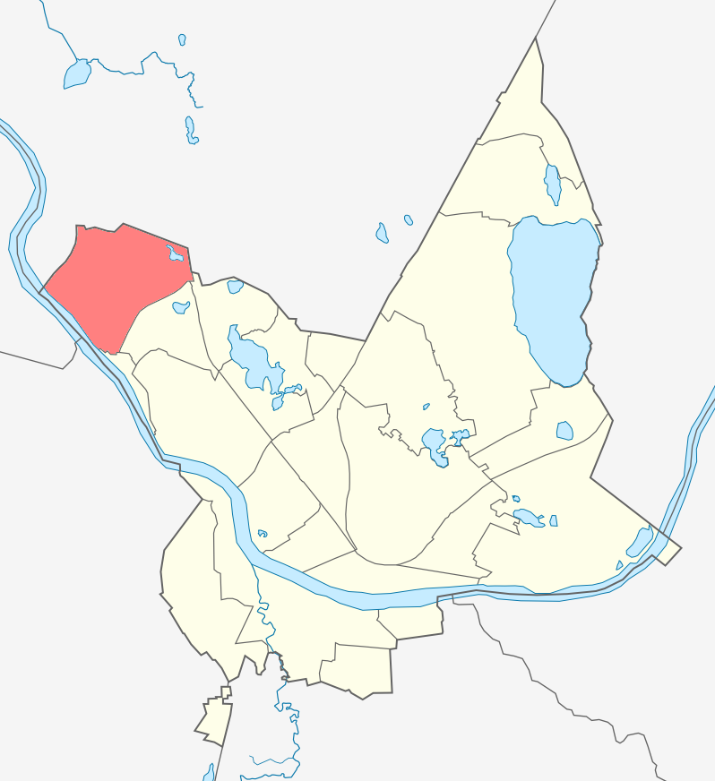 Микрорайон Межциемс карте Даугавпилса.